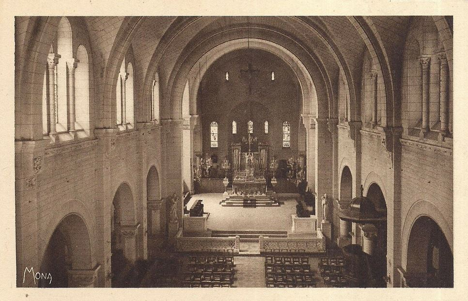 Montreuil-sous-Bois.Eglise Saint-André.Choeur